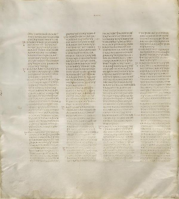 page of the codex with text of Matthew 7:27-8:28